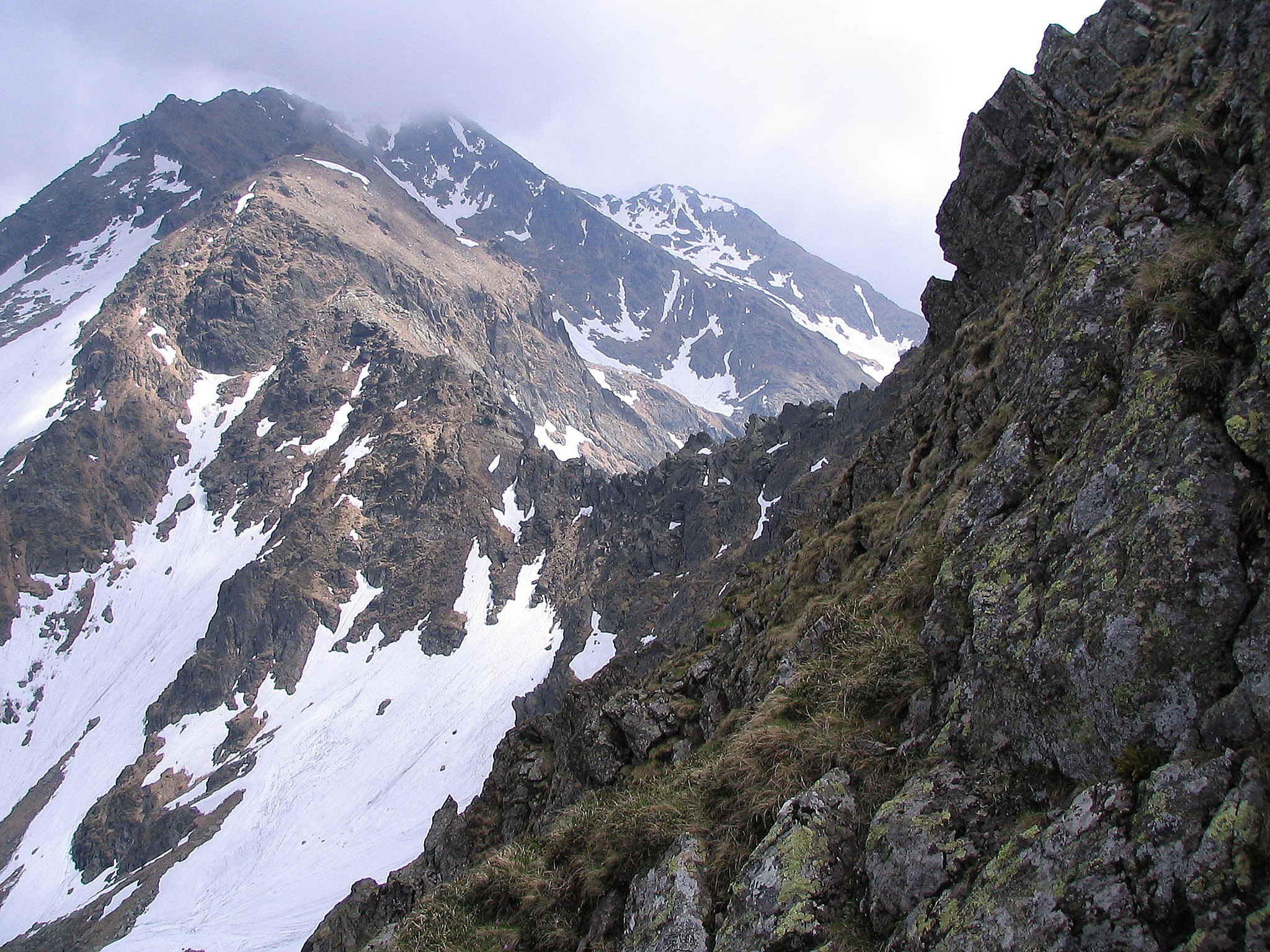 Grań Custura Saratii widziana z północnej grani Serboty. Wierzchołek Negoiu przysłania chmura